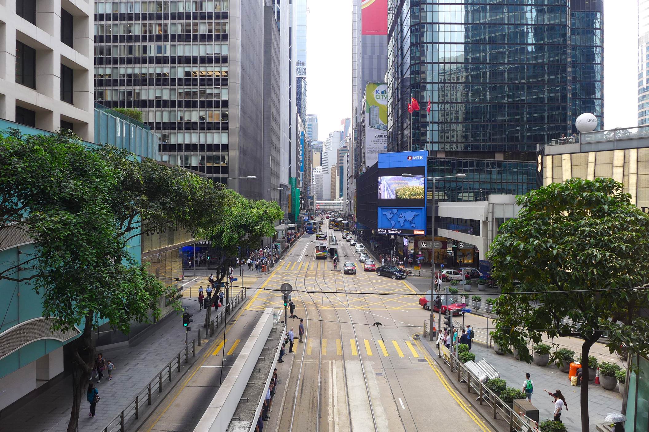 Des Voeux Road Central